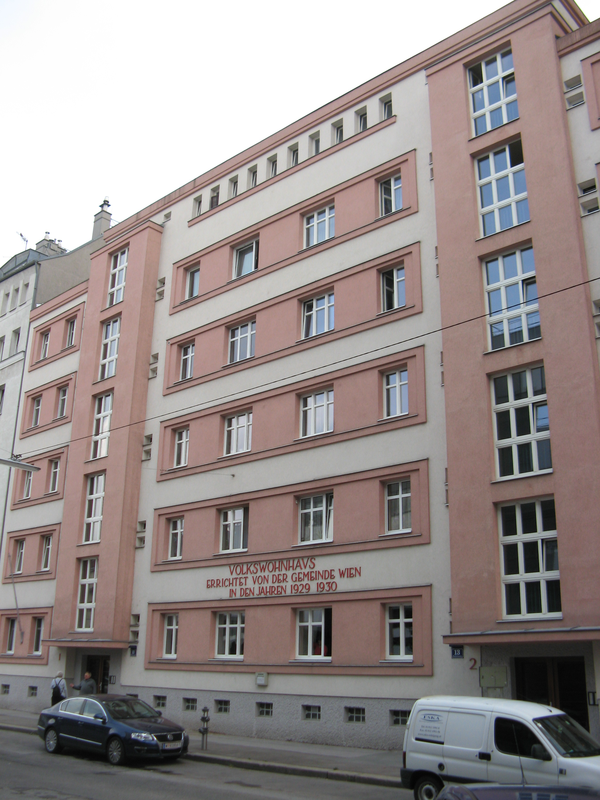 Wohnhaus (1929-30), Puchsbaumgasse 11-13, Wien-Favoriten This media shows the Vienna residential building (Gemeindebau) with the ID 734.